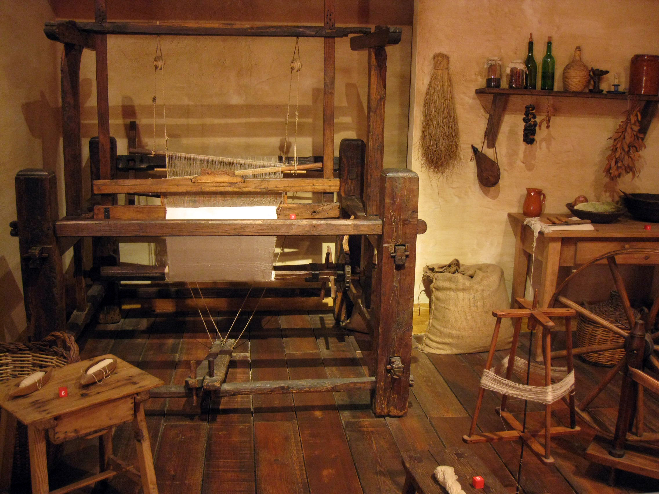 Fàbrica Aymerich, Amat i Jover (Terrassa) Object location41° 33′ 54.49″ N, 2° 00′ 28.14″ E The above coordinates are missing from linked Wikidata item M28083338. Click here to copy it